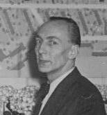 Zentralbild Schmidtke 8.4.1952. Zum Nationalen Aufbauprogramm. Pressekonferenz der Deutschen Bauakademie am 8.4.1952 beim Amt für Information in Berlin. UBz: Prof. Edmund Collein bei seinem Vortrag. Davor Prof. Dr. Liebknecht und Prof. Dr. Henselmann.